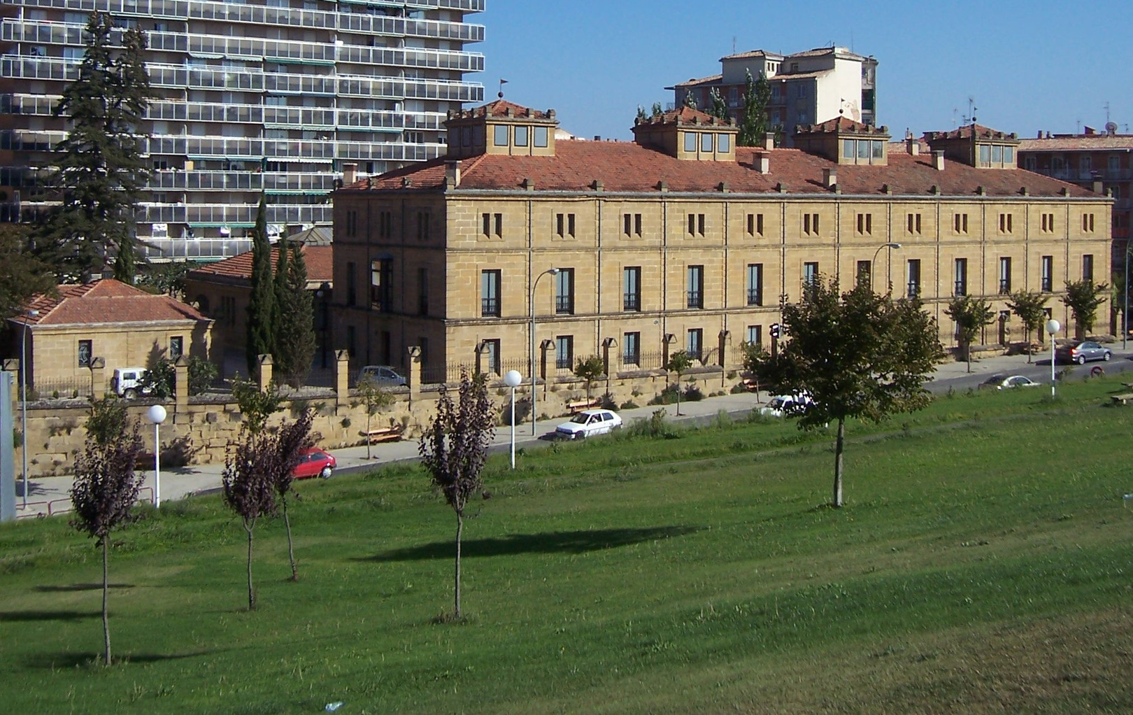 Edificio de la estación enológica de Haro. La Rioja (España)